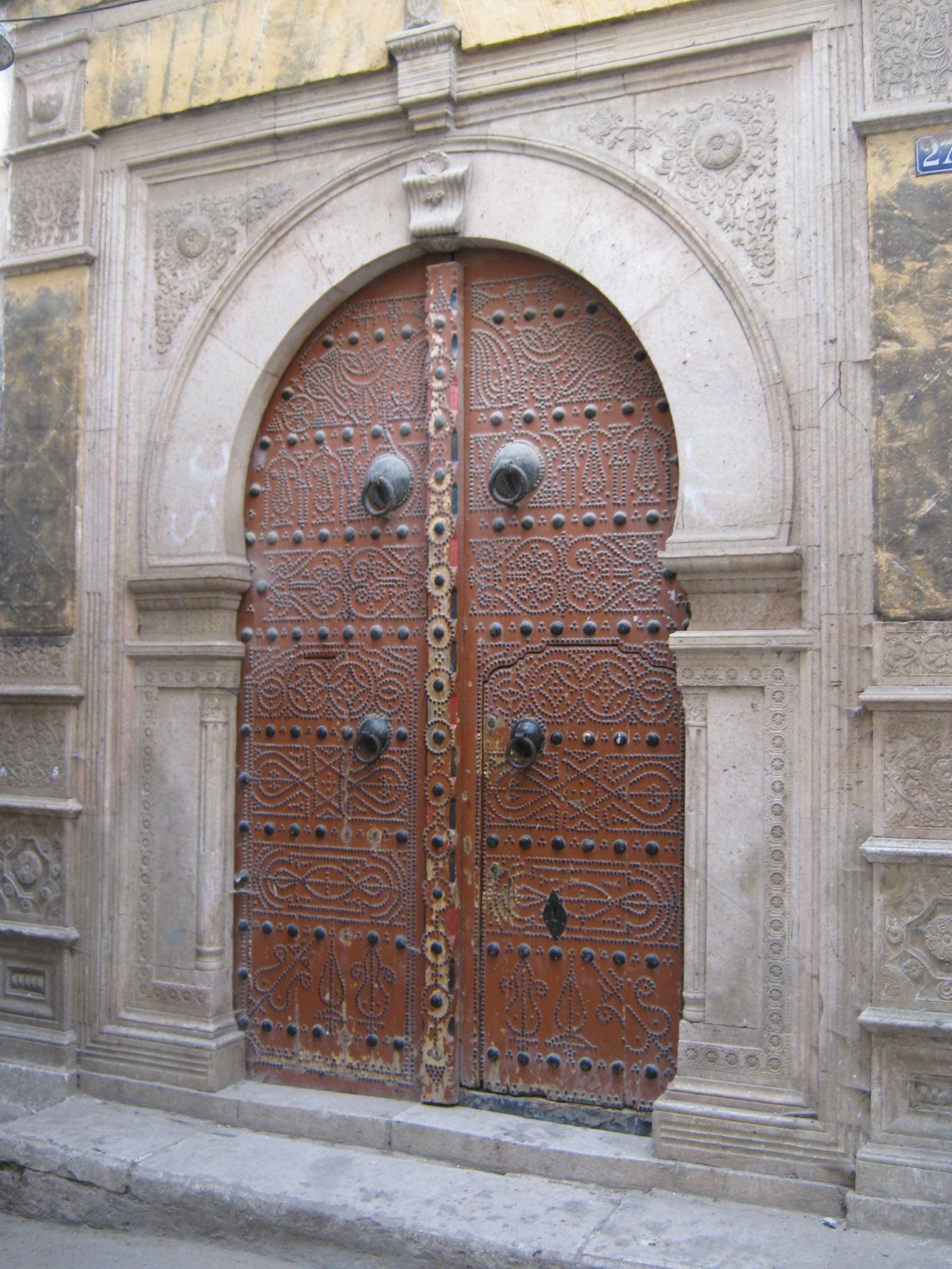 Porte au 27 rue sidi bou khrissane